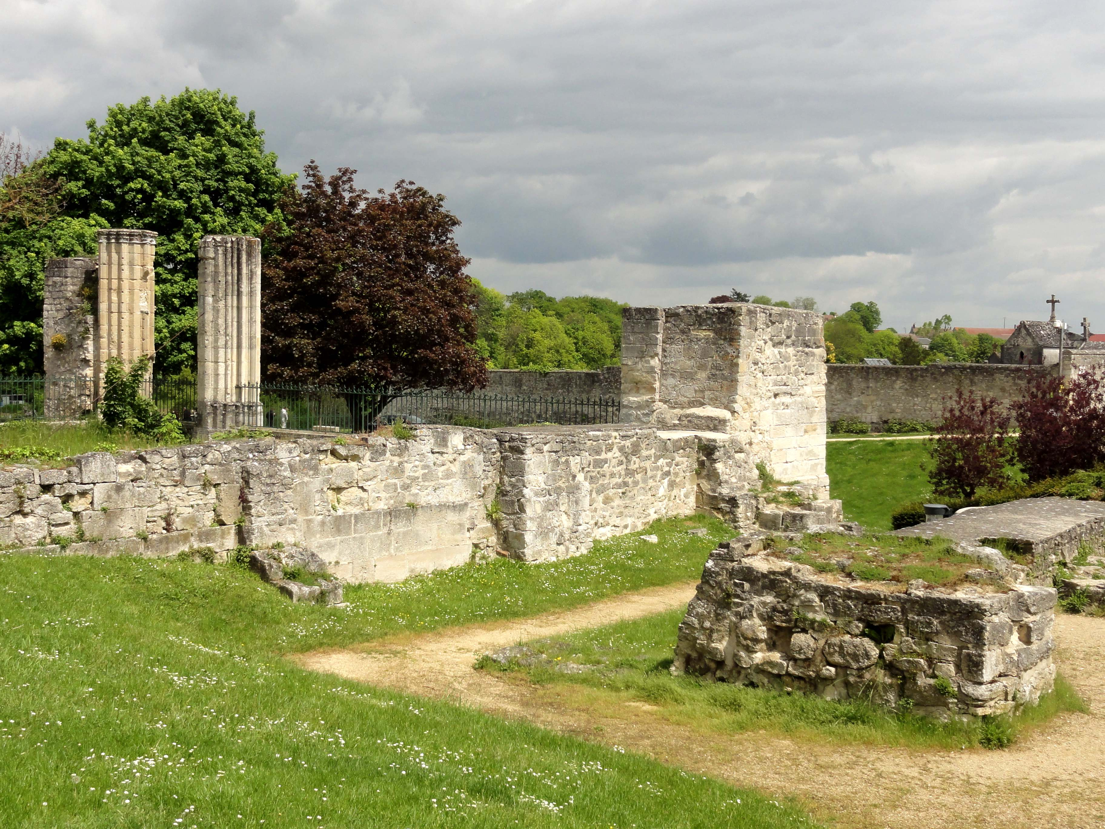 Prieuré Saint-Arnoul de Crépy-en-Valois - voir titre.